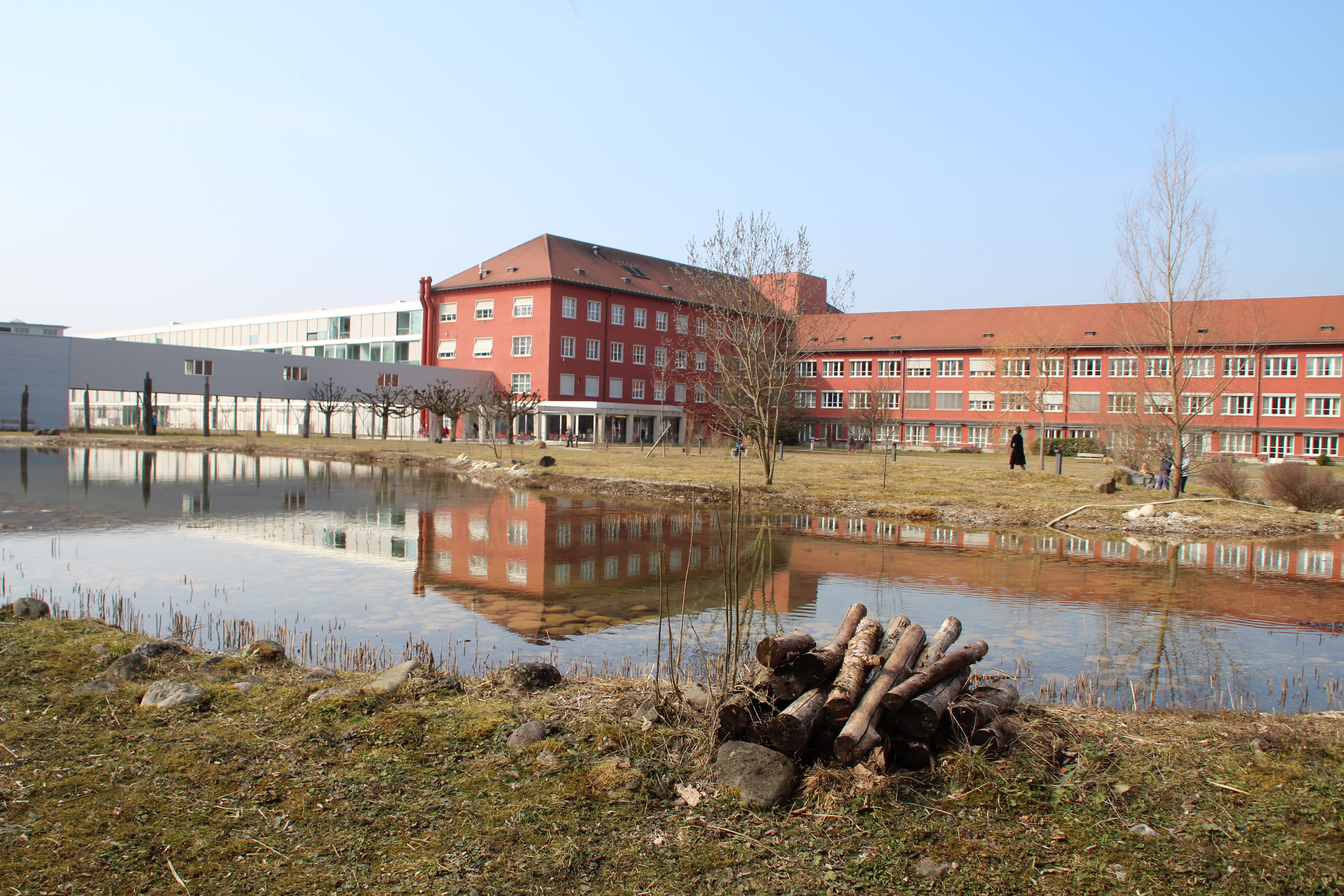 Spital Zollikerberg: Park